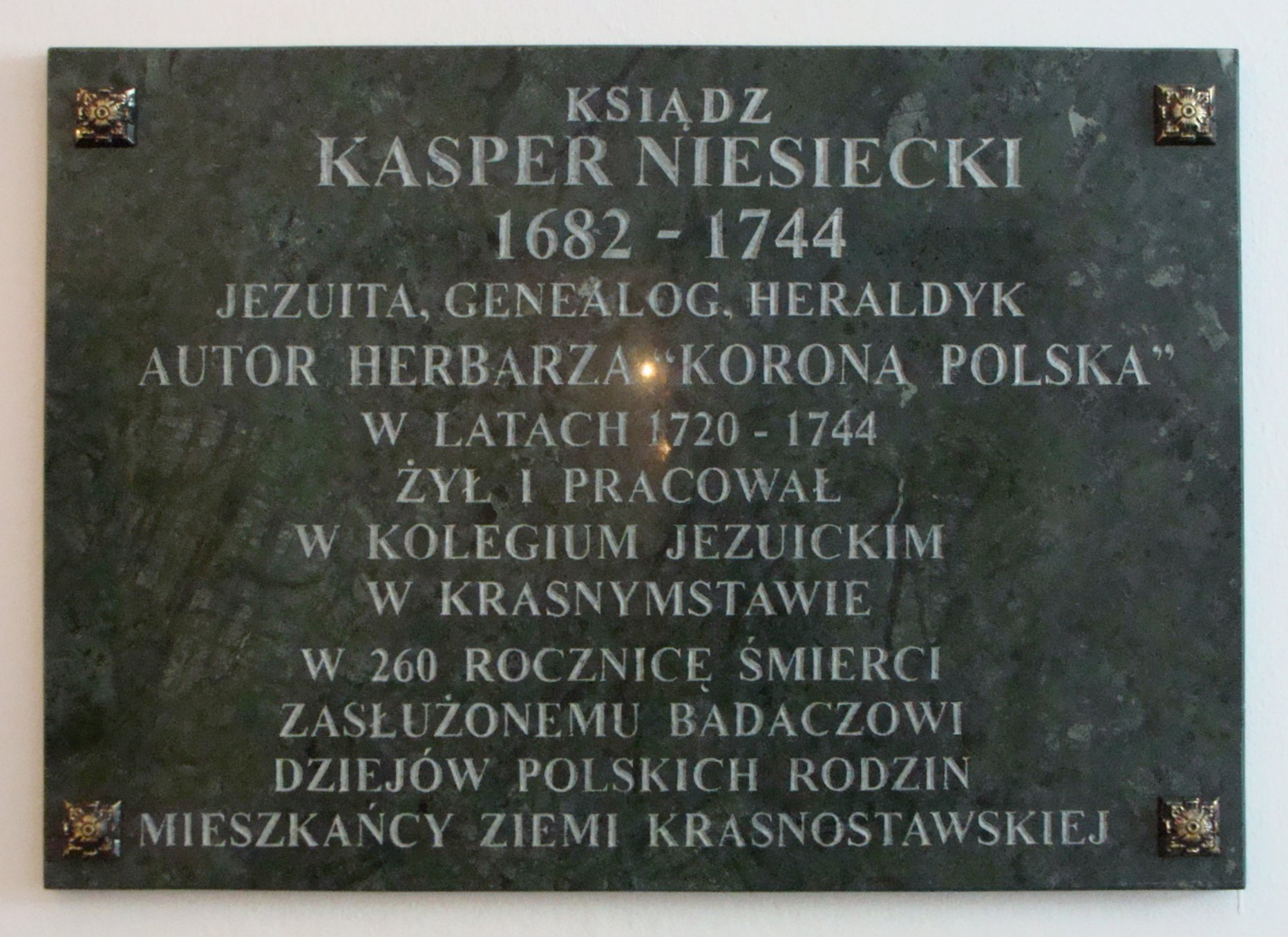 Tablica pamiątkowa Kaspra Niesieckiego - dawne kolegium jezuickie w Krasnymstawie - obecnie Muzeum Regionalne w Krasnymstawie